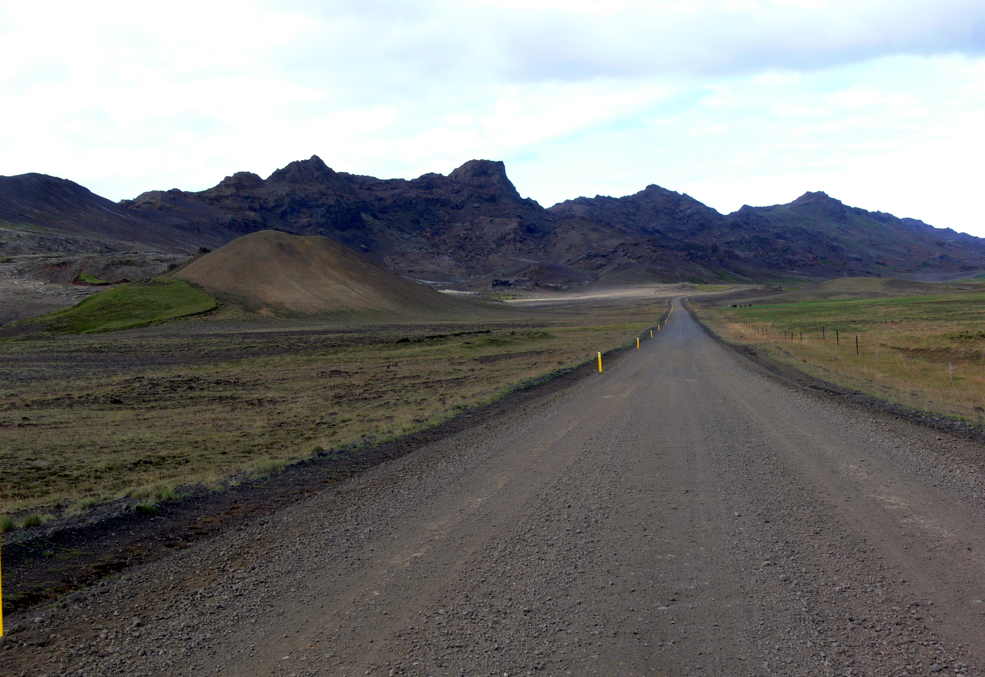 Straße von Krýsuvík zum Kleifarvatn.